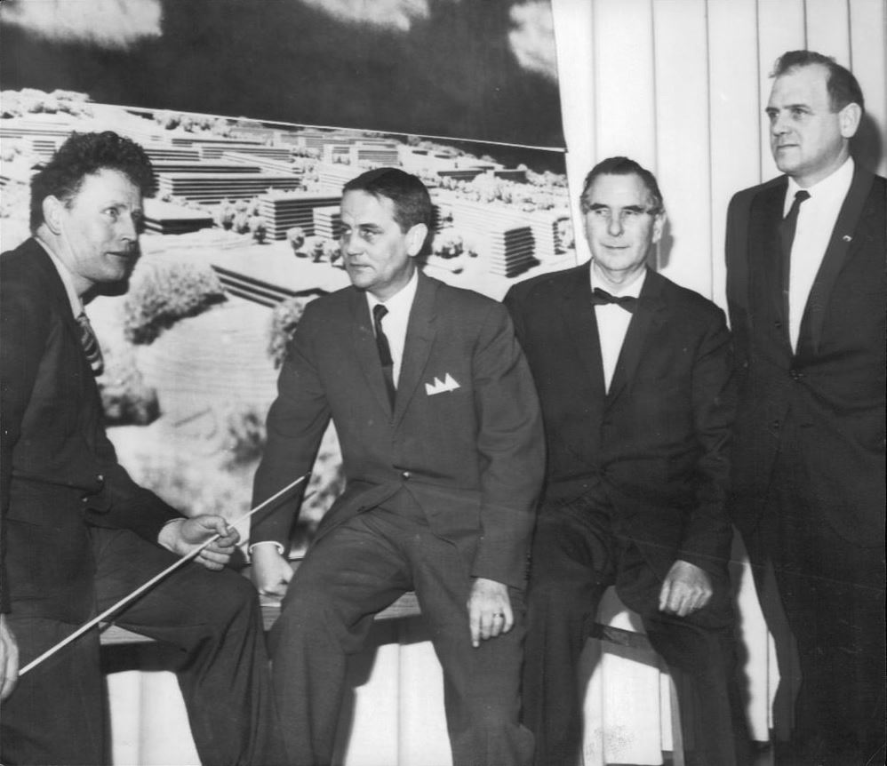 Arkitekt Lars Stalin (1924-1993), stadsfullmäktiges ordförande Bengt Glemdal (1918-2005), direktören i stiftelsen Bostadshus K.G. Karlsson och stiftelseordförande Ingvar Karlsson presenterar det planerade bostadsområdet Råslätt i Jönköping.